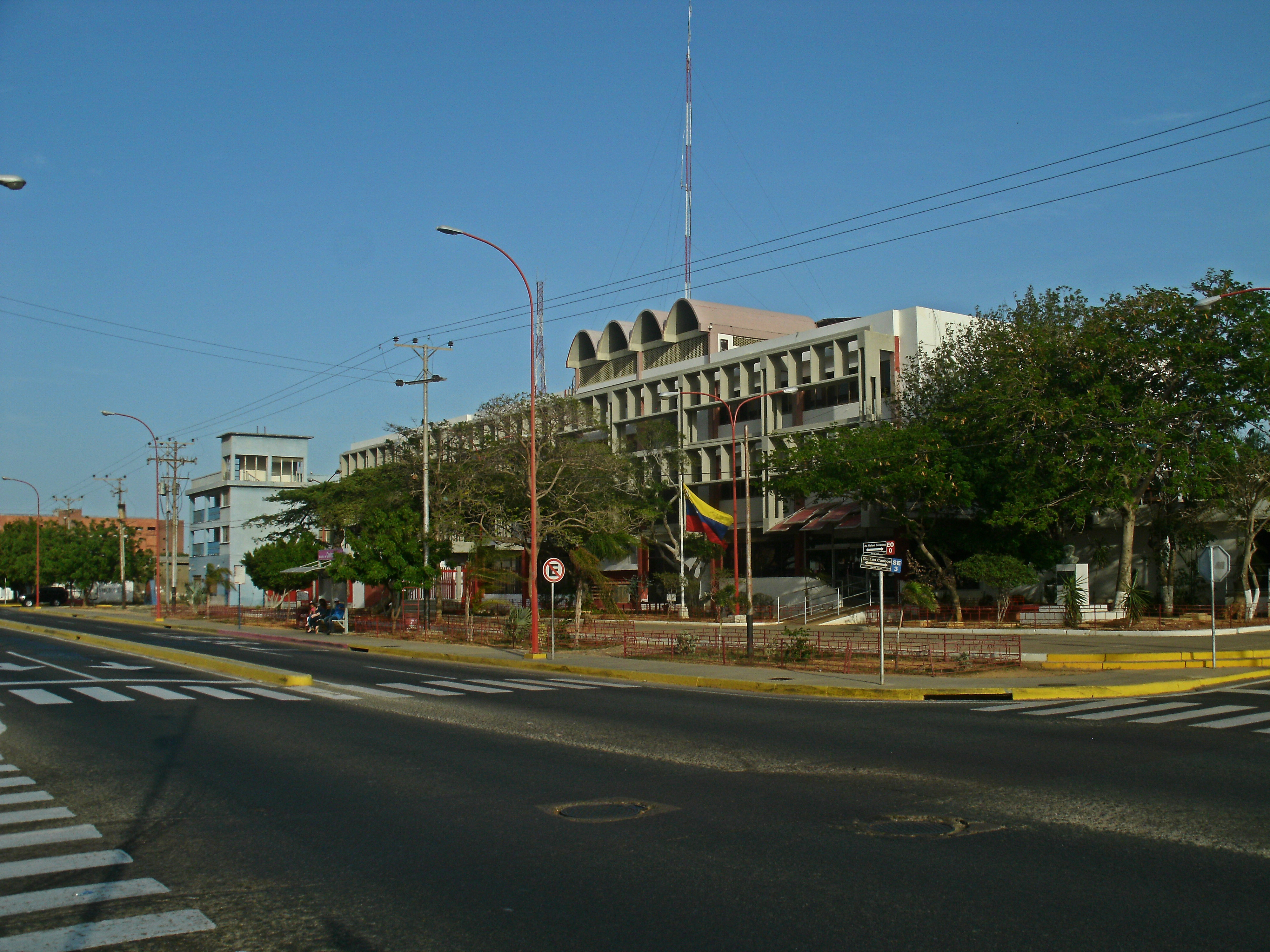 Alcaldía y concejo municipal de Carirubana.